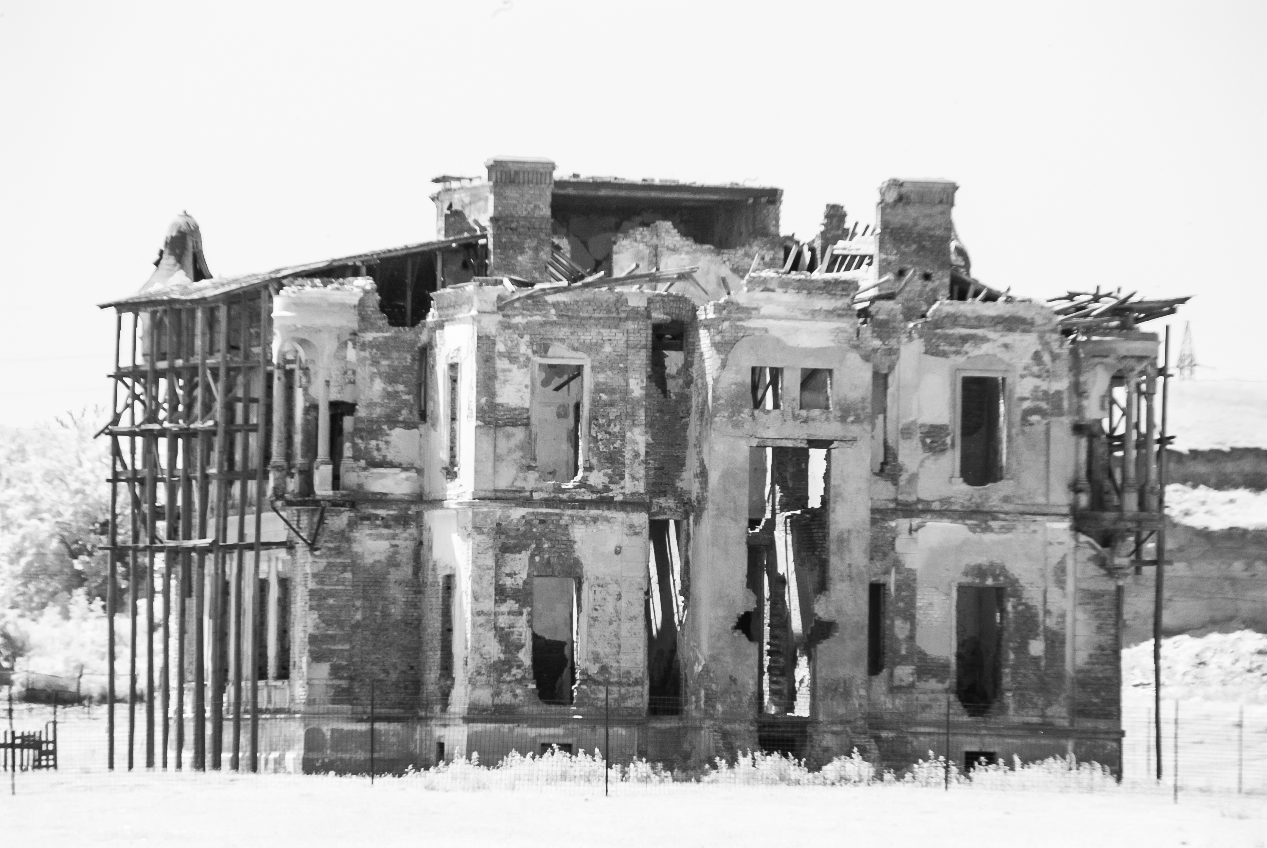 Conacul Bolomey, vedere dinspre N-E, infraroșu 01